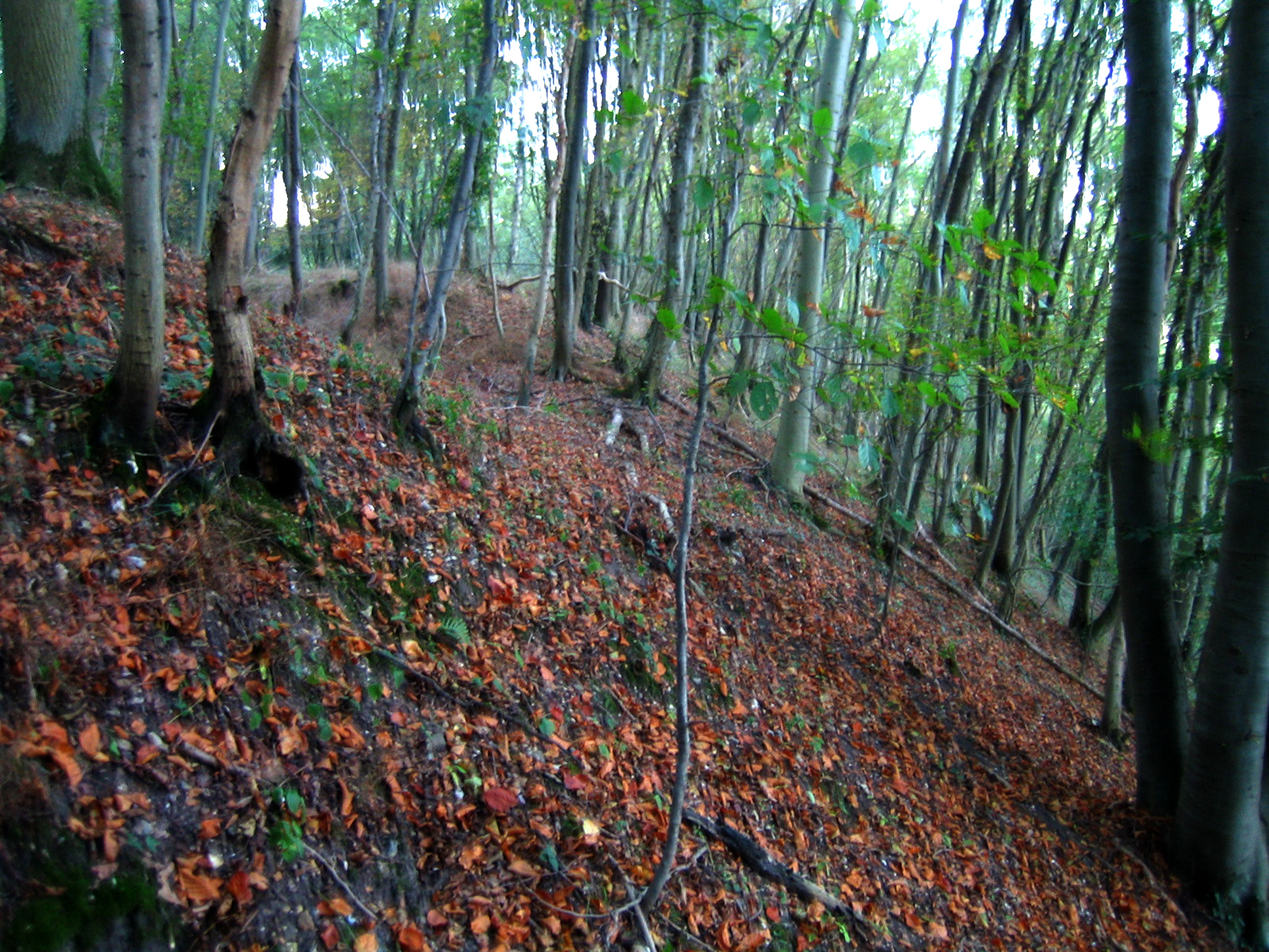 Liercourt (Somme, France) - Talus de l'oppidum. .